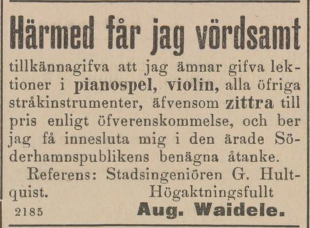 August Waidele, annons i Söderhamns Tidning 1893-10-09